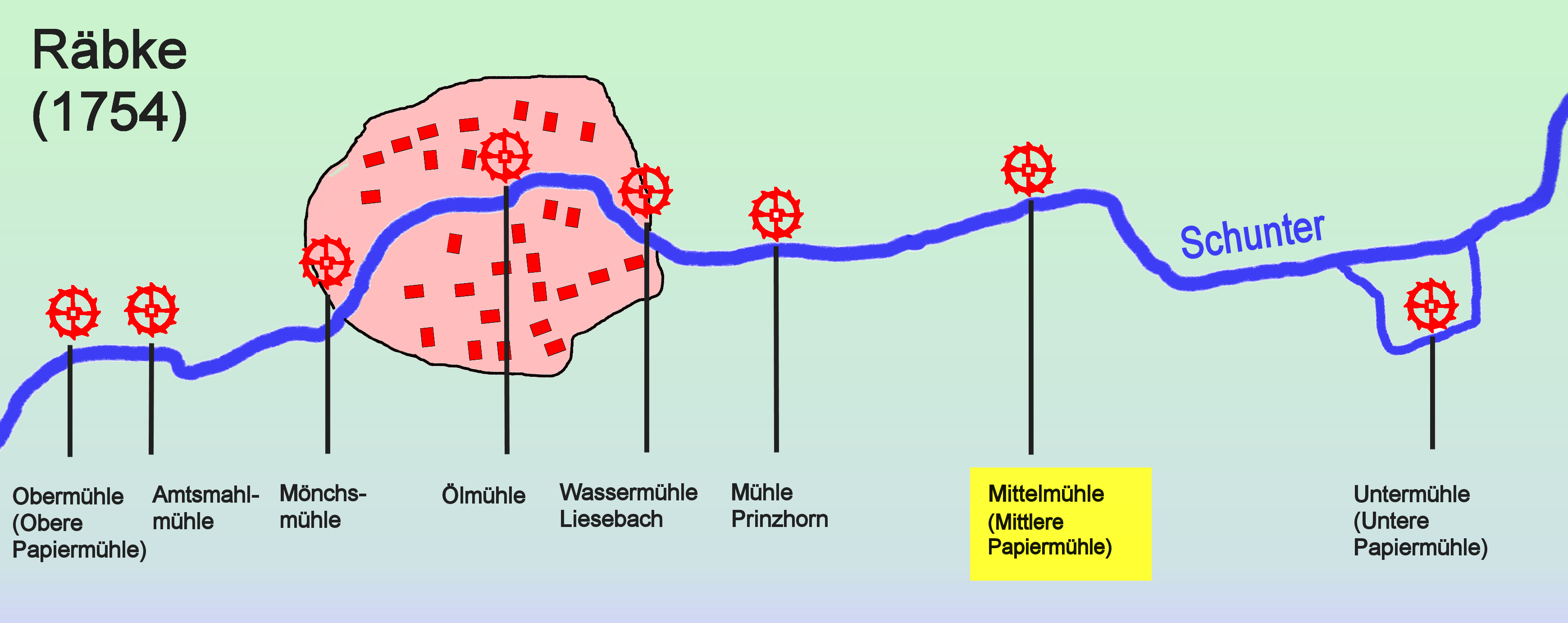 Mittelmühle von Räbke, Zeichnung nach der Braunschweigischen General-Landesvermessung von 1754